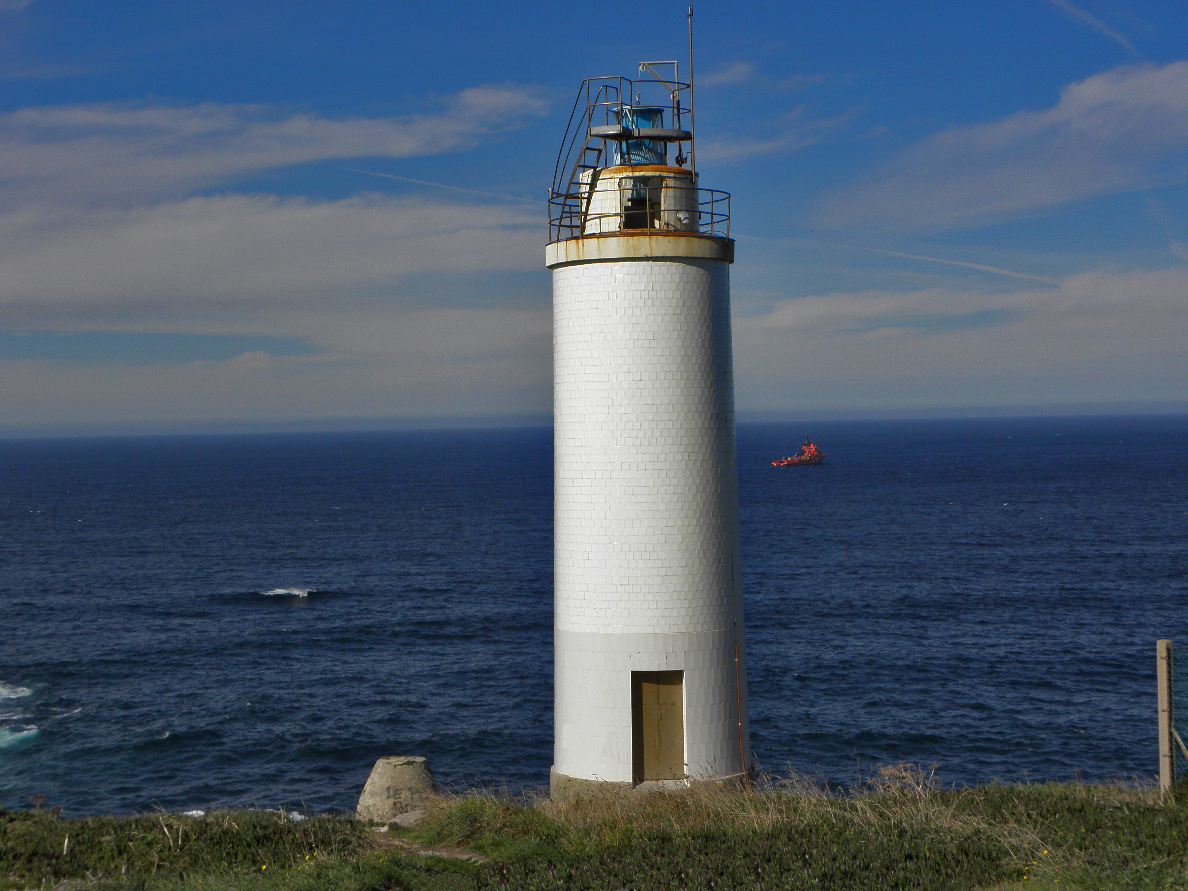 Faro Laxe